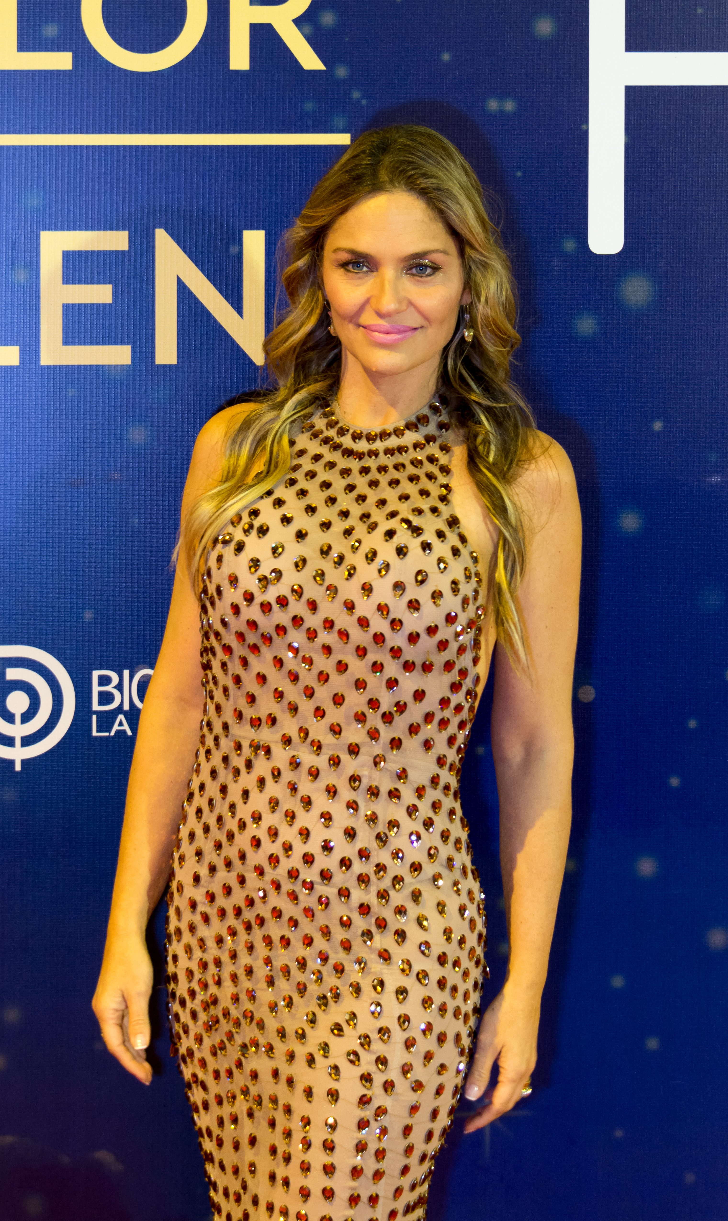 María Eugenia Larraín, Premios Pulsar 2019, Teatro Teletón, Santiago, Región Metropolitana, Chile.